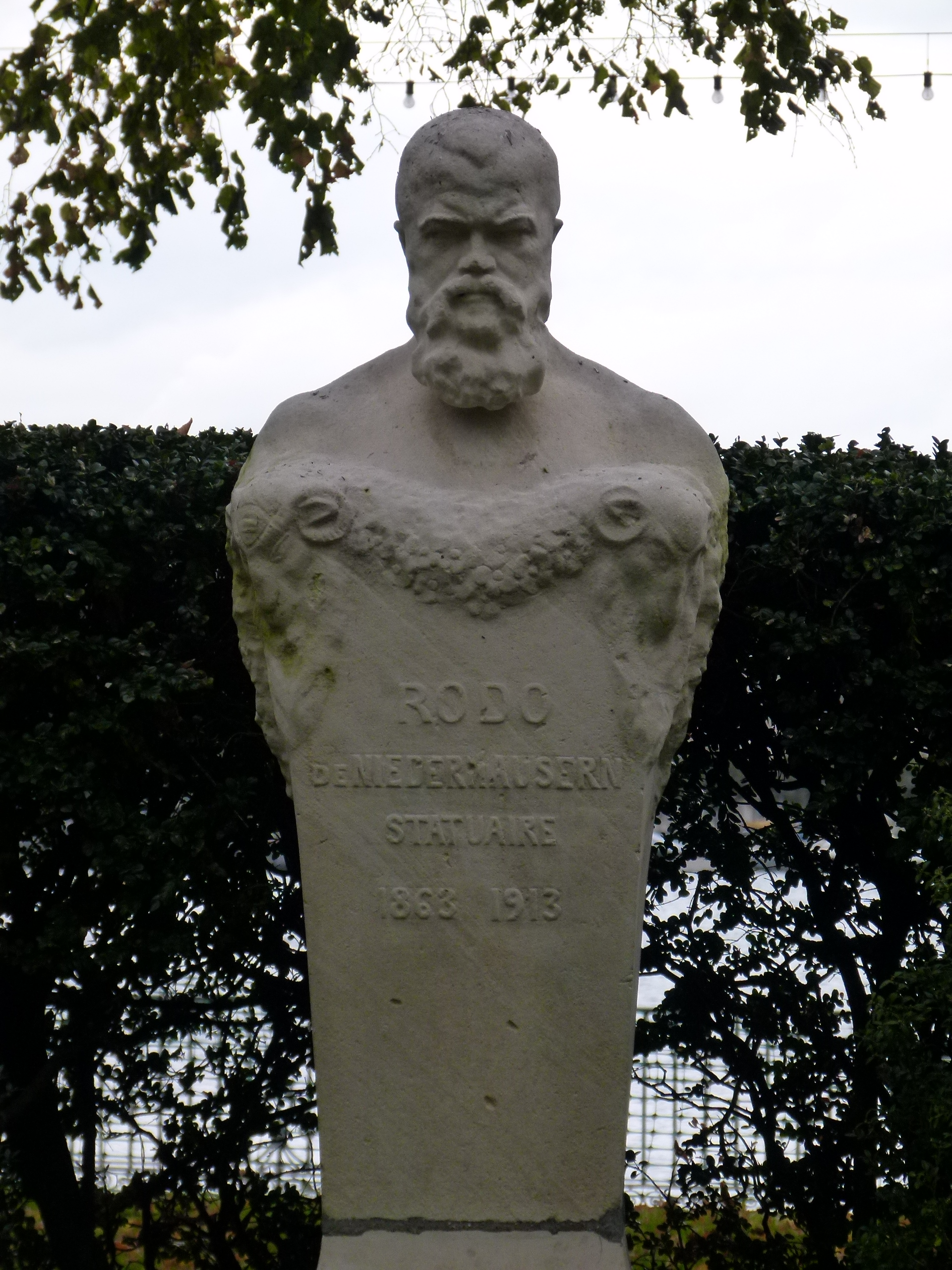 Denkmal für Auguste de Niederhausern-Rodo im Englischen Garten in Genf